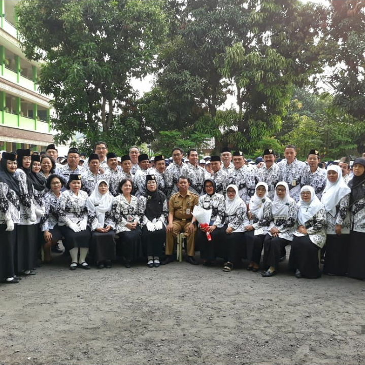 Didalam foto ini terdapat guru SMPN 205